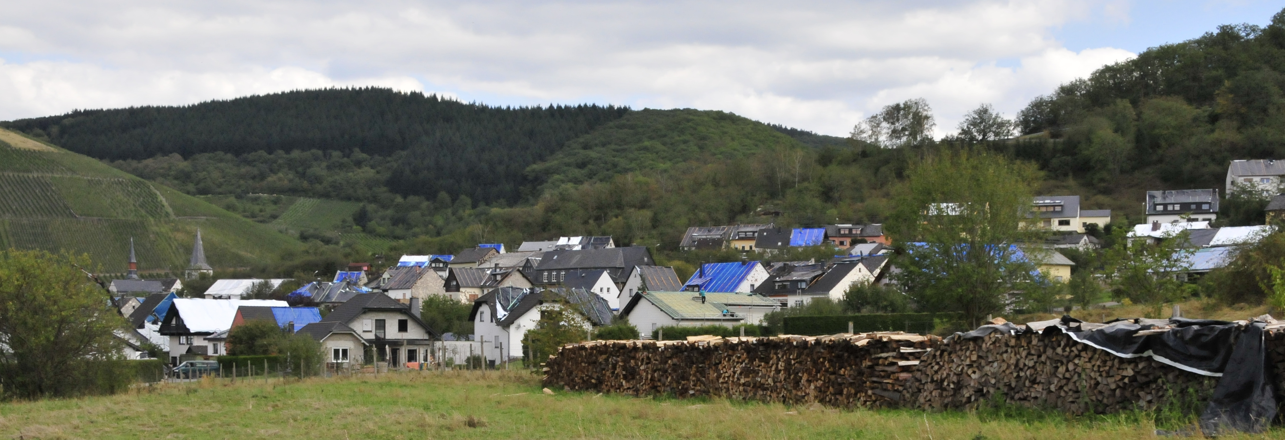 Veldenz am 29.08.2911 nach Hagelschlag.